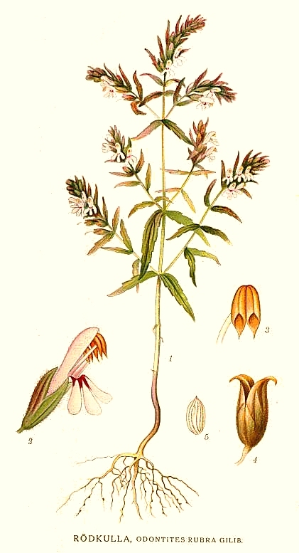 Odontites vulgaris Moench, syn. Odontites rubra Gilib. Original Description Rödkulla, Odontites rubra Gilib.